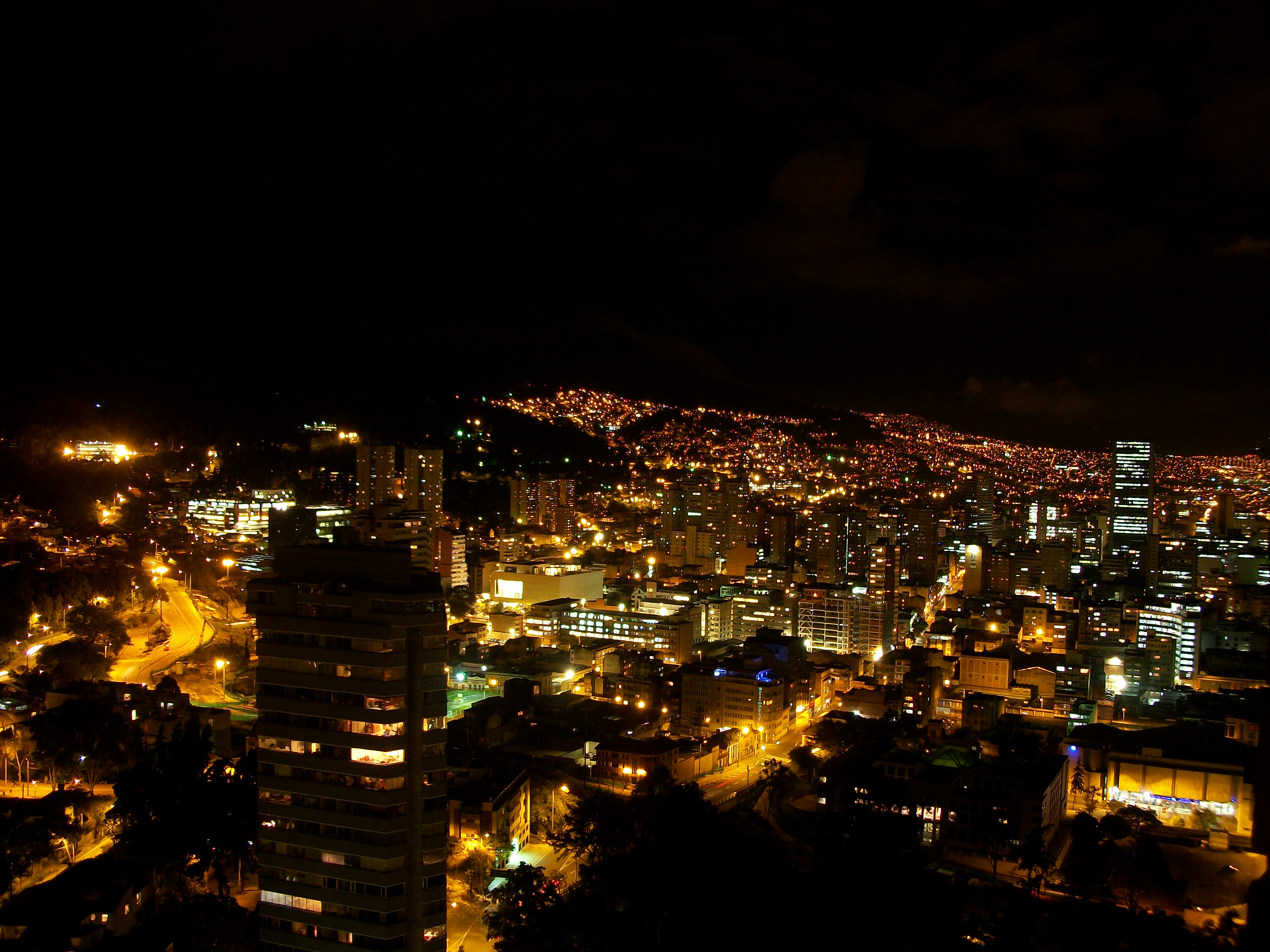 Vista nocturna del barrio Las Nieves, Bogotá, desde torre A de las Torres del Parque.